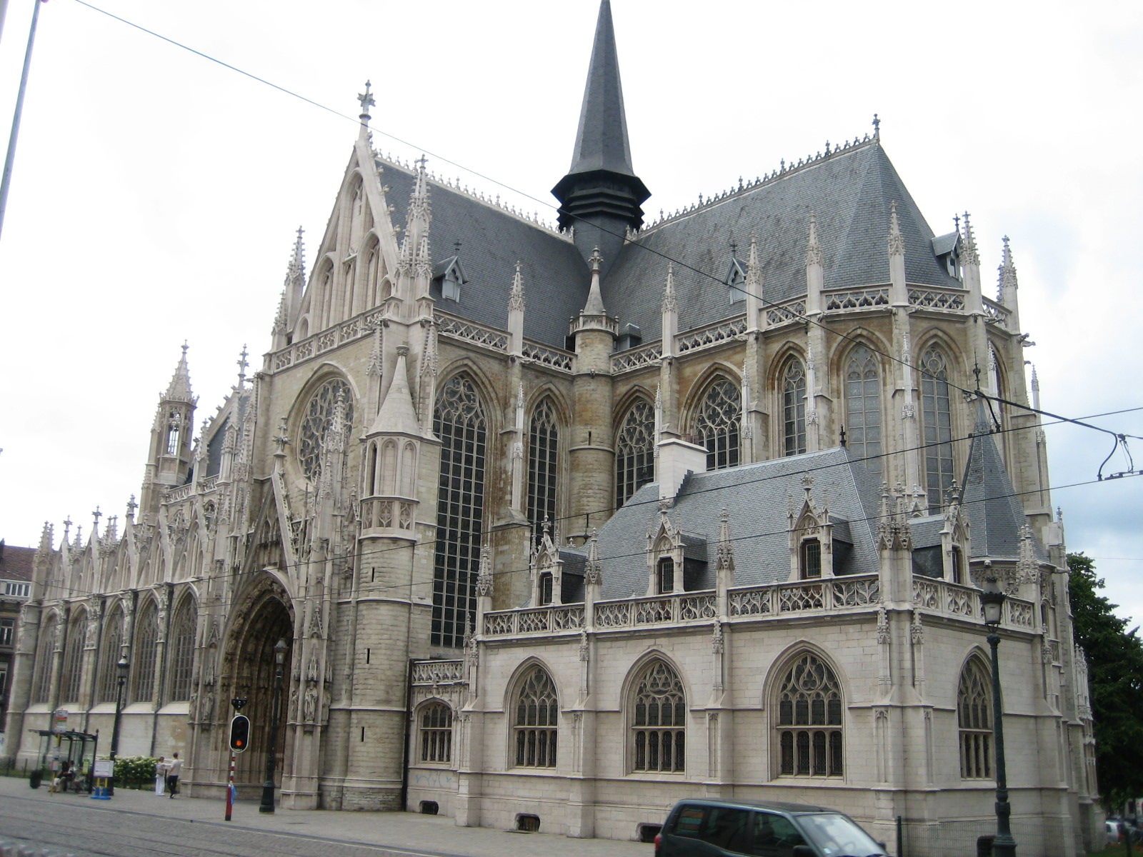 D'Kierch Notre-Dame du Sablon / O.L. Vrouw ten Zavel zu Bréissel.